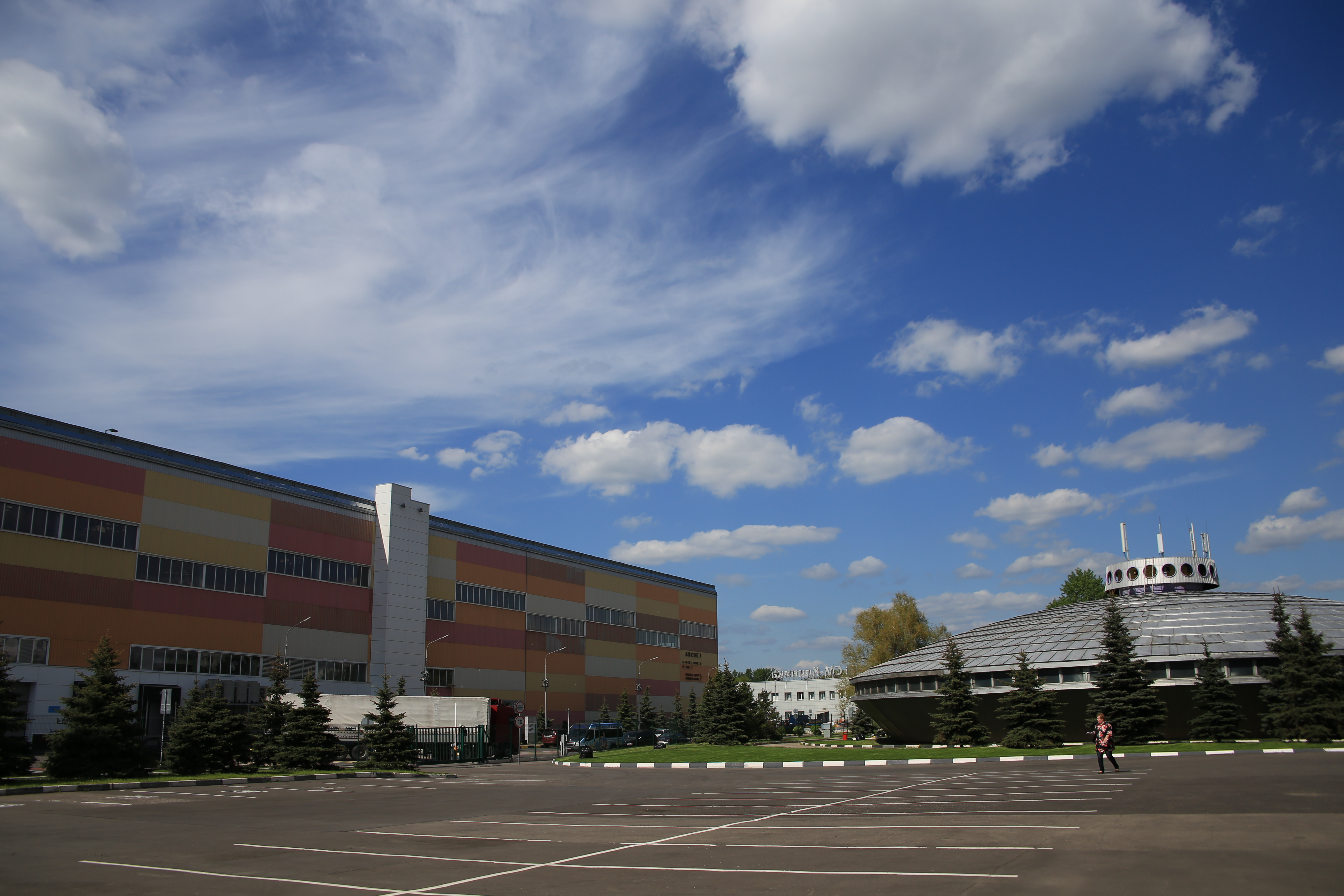 Технополис «Москва». Вид с улицы.